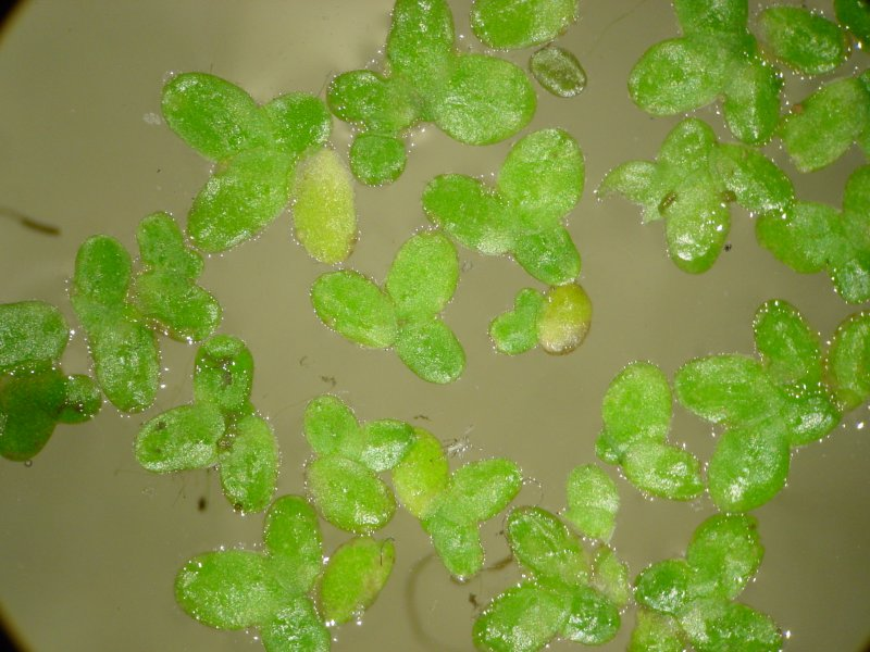 Kleine Wasserlinse Lemna minor